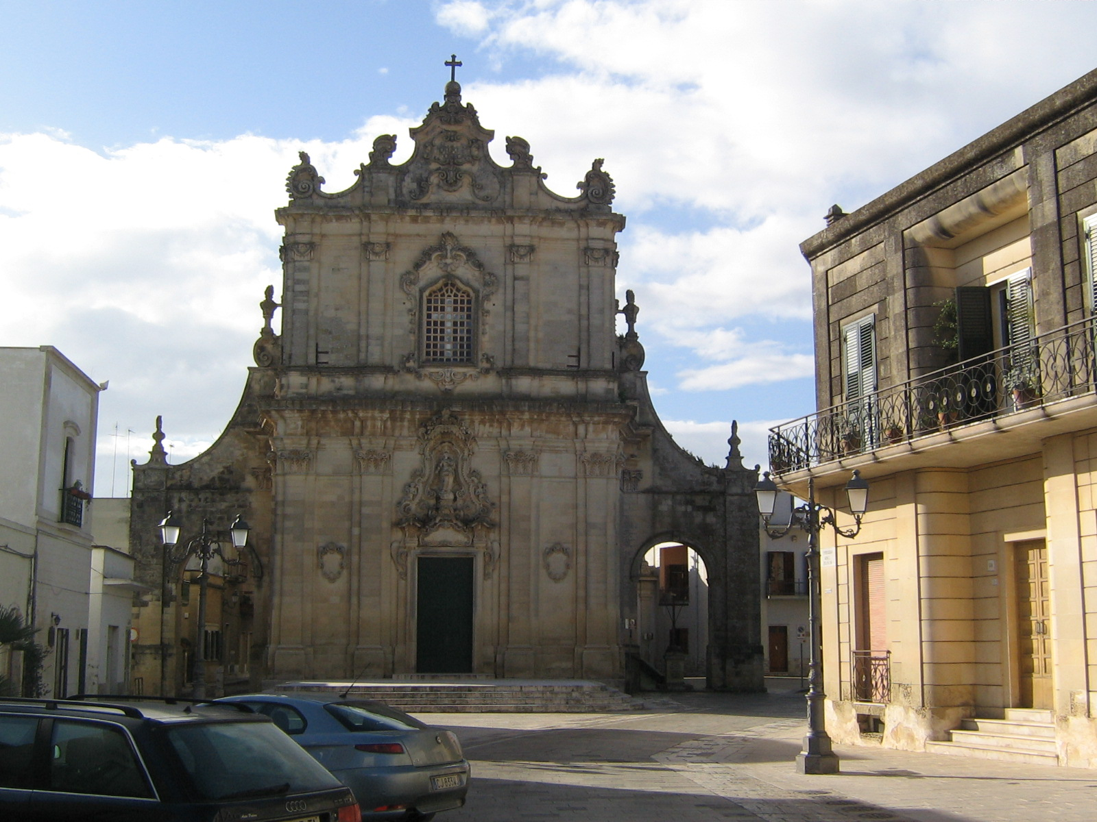 Muro Leccese: chiesa dell'Immacolata.